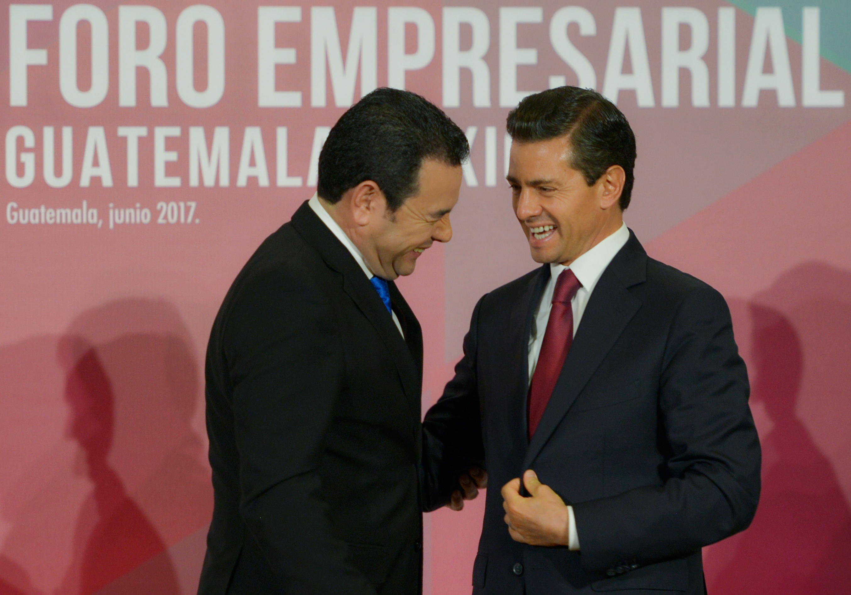 Visita de Estado a Guatemala (día 2) (9)